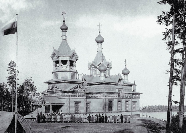 Николаевский Кондостровский скит